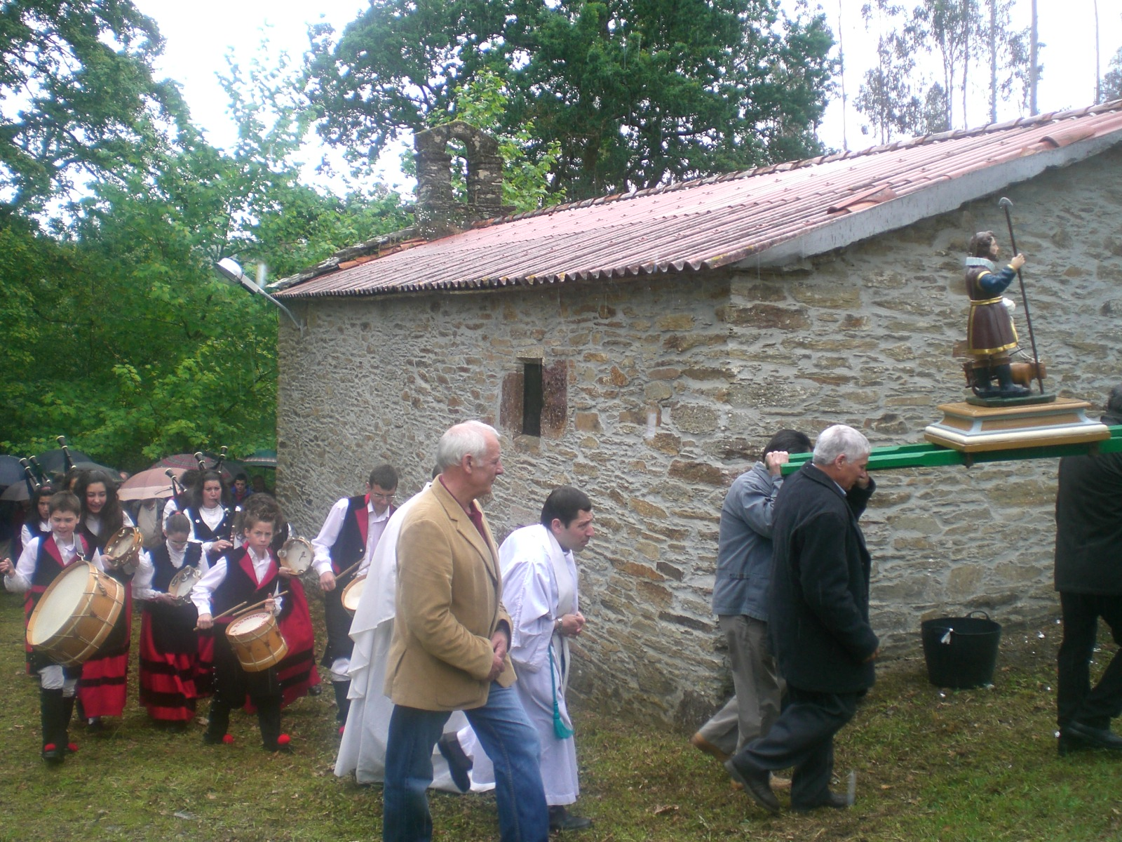 Procesión na romaría do San Cidre na parroquia de Bama (Touro-Galicia)